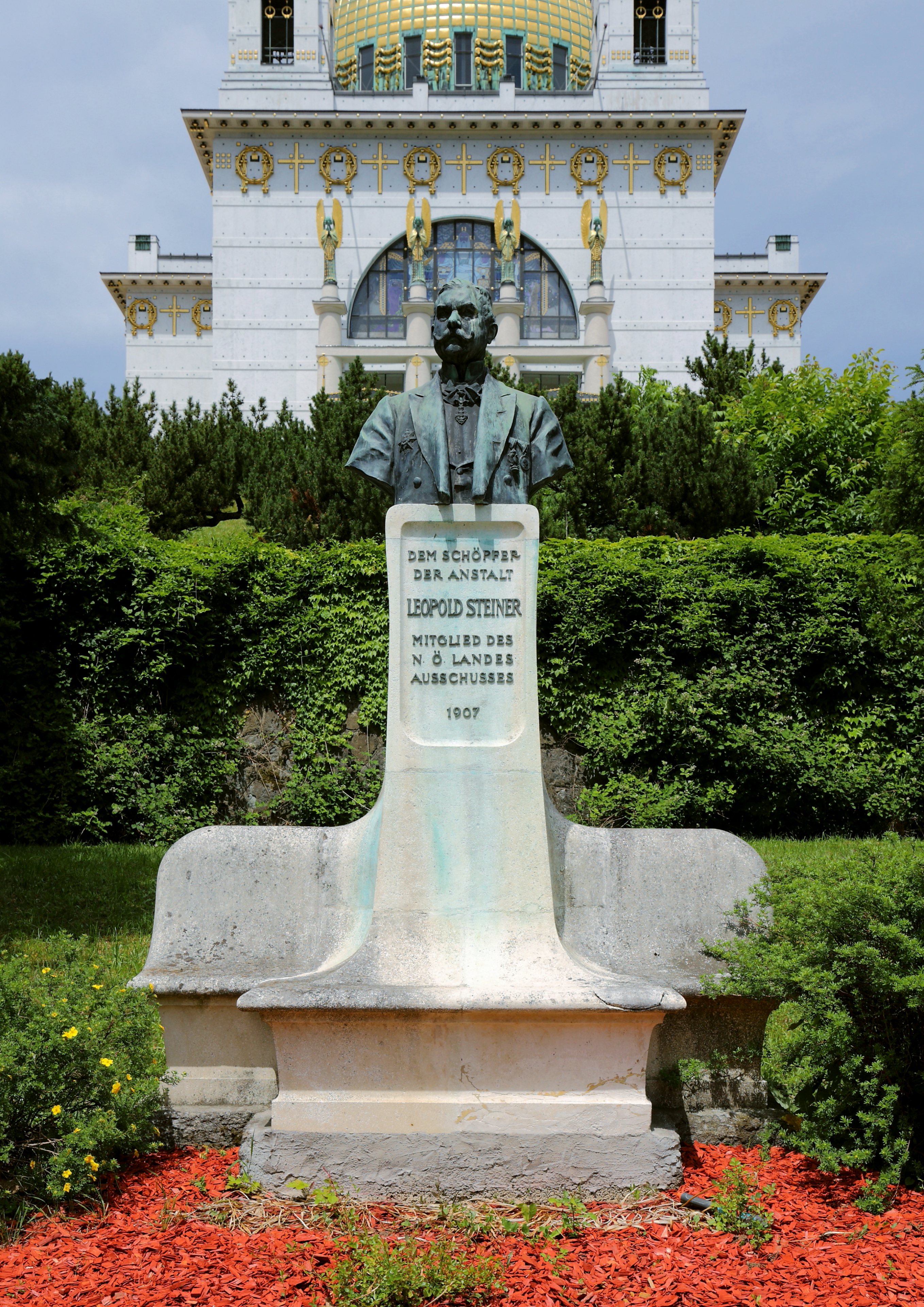 Denkmal für Leopold Steiner unterhalb der Kirche am Steinhof auf dem Gelände des Sozialmedizinischen Zentrums Baumgartner Höhe bzw. Otto-Wagner-Spitals im 14. Wiener Gemeindebezirk Penzing. Das Denkmal entstand 1907. Steiner, späterer Landeshauptmann von Niederösterreich, hatte die Bauoberleitung der Spitalsanlage inne.